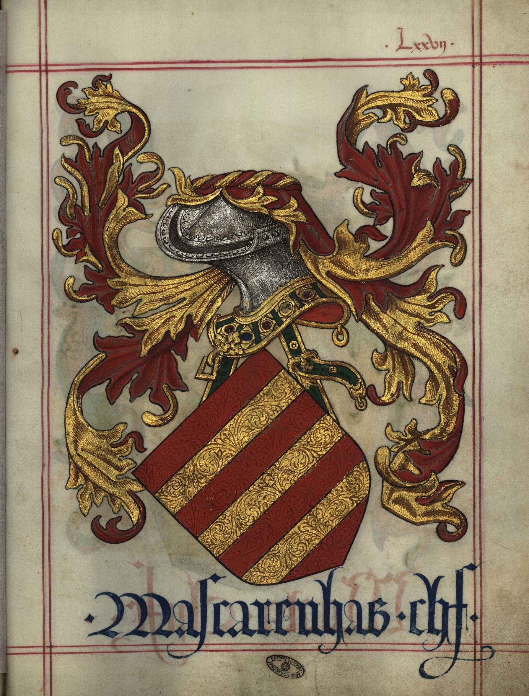 Livro do Armeiro-Mor, Mascarenhas (fl 77v)